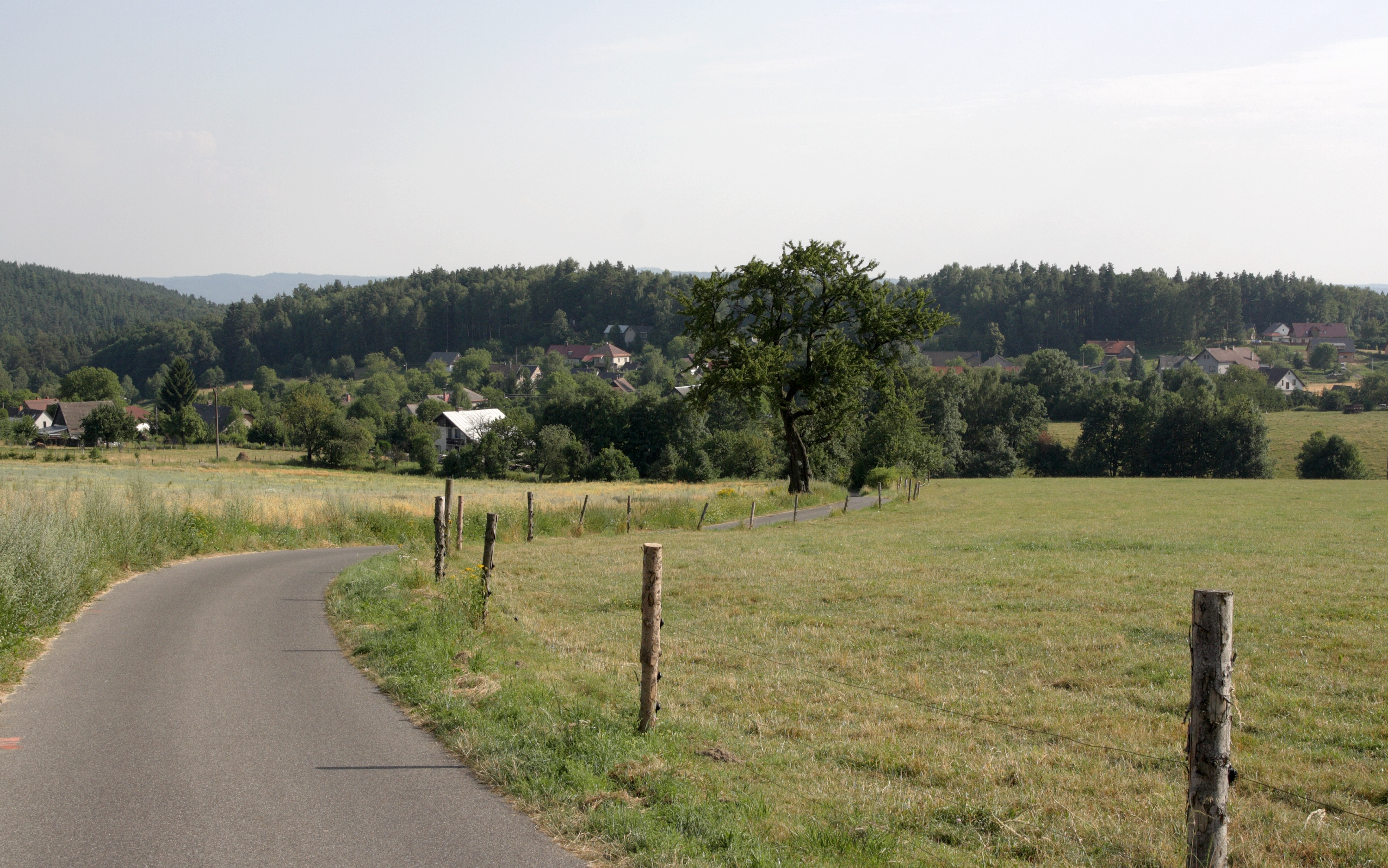 Voděrady - pohled ze severu, od silnice do Frýdštejna.